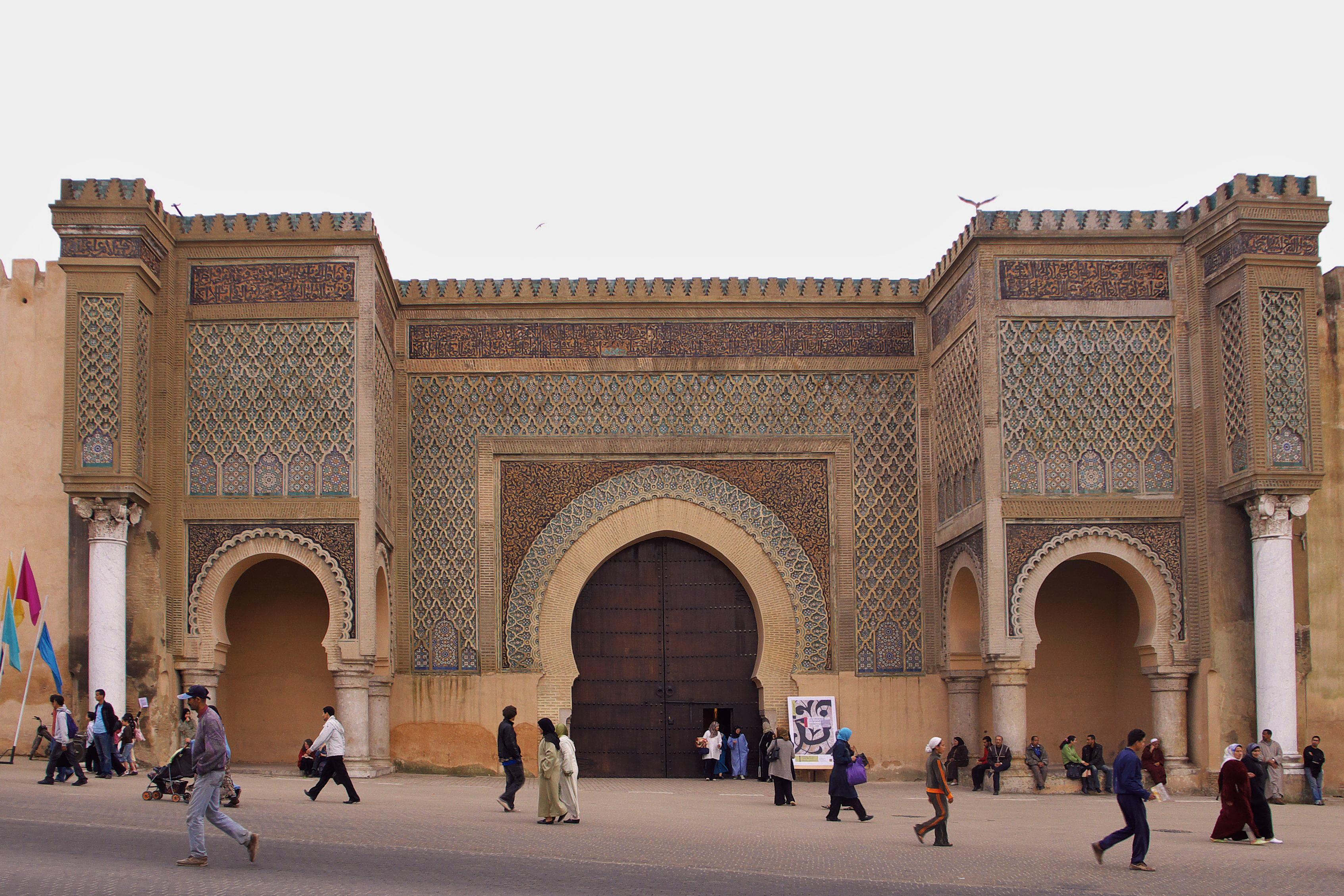 La puerta del arquitecto el-Mansour el Aleuj (1734), mandada a construir por el sultán Mulay Ismaíl (†1727) y terminada durante el reinado de Moulay Abdallah. En la decoración emplea elementos almohades.